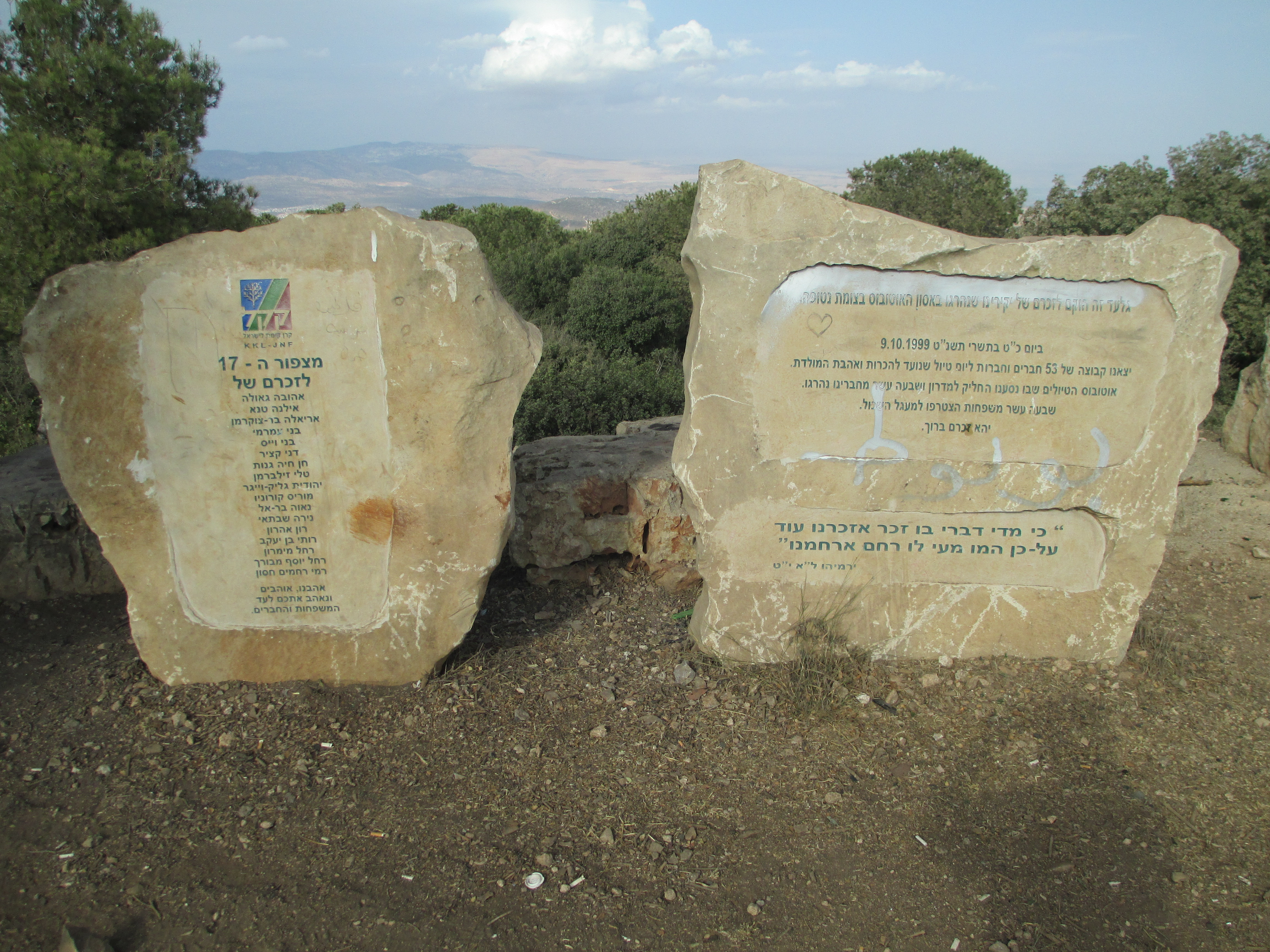 מצפור ה-17 על הר תורען